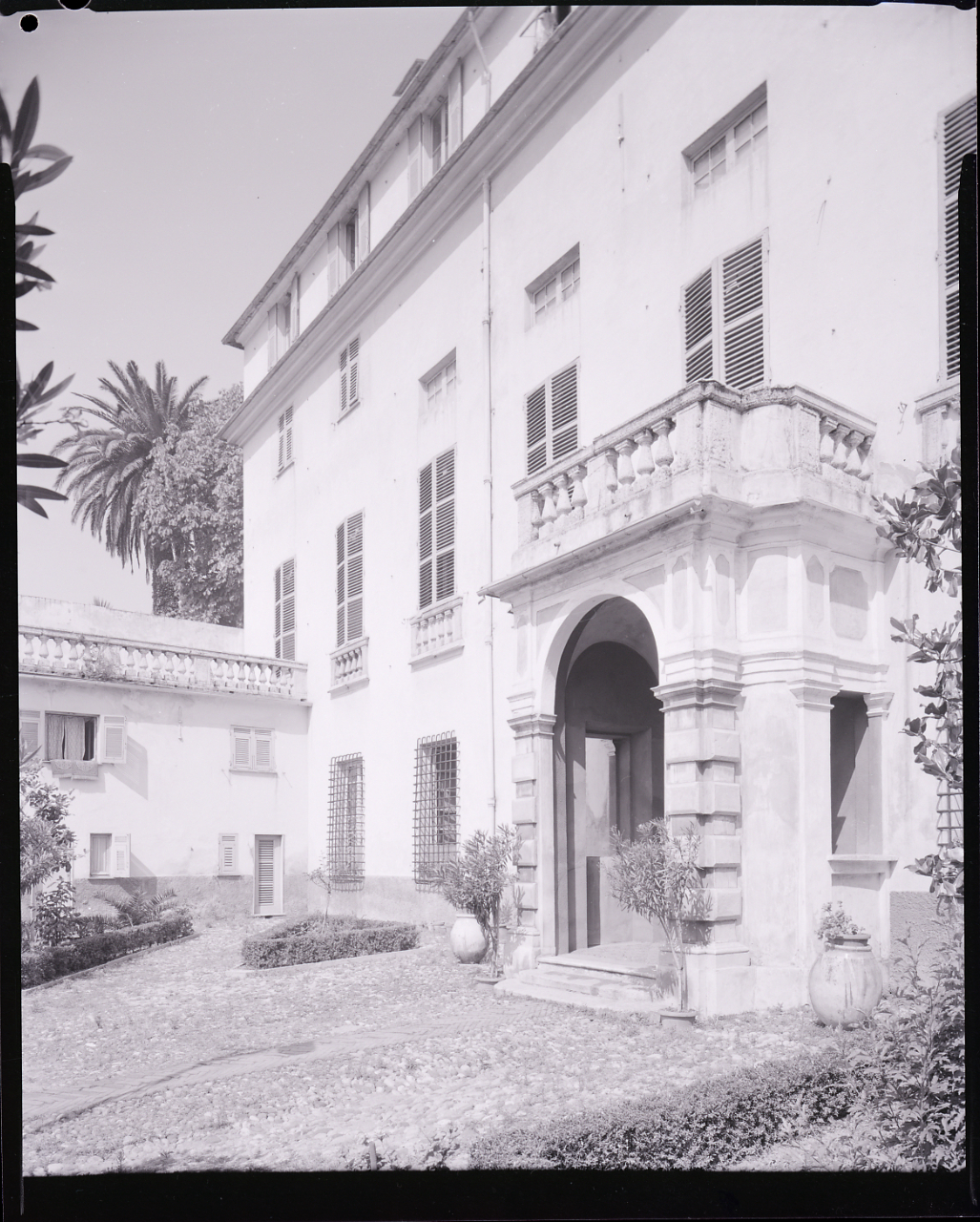 Servizio fotografico : Genova, 1963 / Paolo Monti. - Buste: 14, Fototipi: 14 : Negativo b/n, gelatina bromuro d'argento/ pellicola ; 10x12. - ((Serie costituita da 14 buste sciolte di negativi identificati con i nn.: 6645, 6646, 6647, 6648, 6649, 6650, 6651, 6652, 6653, 6654, 6655, 6656, 6657, 6658. - Il negativo identificato con il numero 46397 è stato realizzato per Zodiac. - Occasione: Documentazione per la pubblicazione: Italia Nostra (a cura di), "Le ville genovesi", catalogo della mostra, Genova 1962, Genova, Comune di Genova, 1967. - Fonte: Monografia di Italia Nostra (a cura di): Le ville genovesi, catalogo della mostra, Genova 1962, Genova, Comune di Genova (1967). - Fonte: Lettera di Paolo Monti: I. Carteggi/ Genova - Enrico (1963-1966), presso Archivio Paolo Monti. Camicia con documenti dattiloscritti e manoscritti vari relativi al lavoro eseguito per Italia Nostra: preventivi, lettere, inventari. - Fonte: Rubrica di Paolo Monti: Archivio fino 1-4-1961/ 31-3-1963 (1961-1963), presso Archivio Paolo Monti. - Fonte: Agenda di Paolo Monti: R 1 - Monti/ 1 aprile 1963 - 6 giugno 1964/ 6000-8193 (1963-1964), presso Archivio Paolo Monti